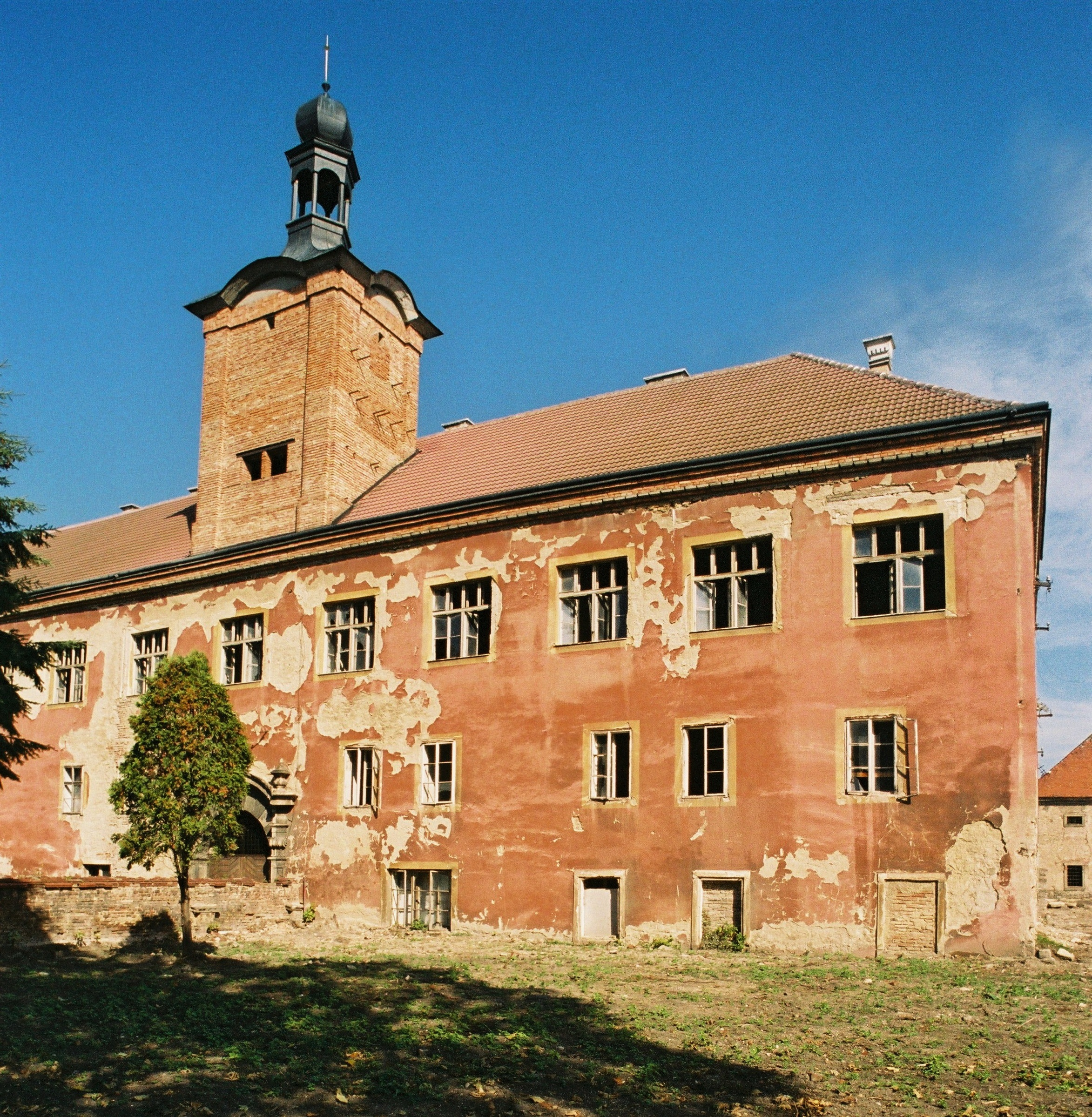 Zámek Kounice, pravá část jihozápadního průčelí. Stav v roce 2004.